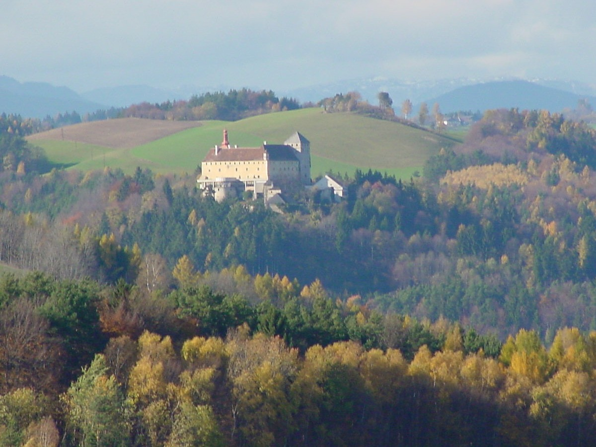 Schloss Krumbach (Niederösterreich)